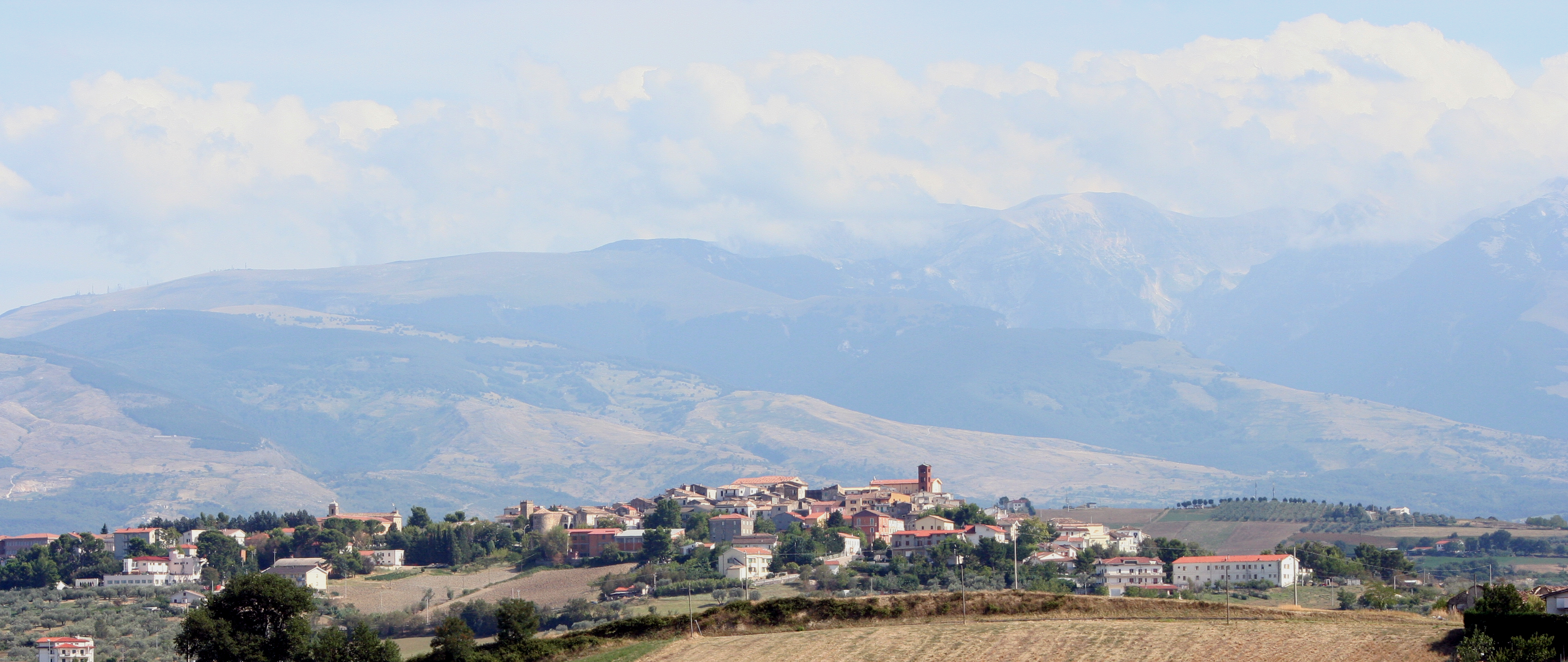 Alanno Veduta del centro storico, Italy